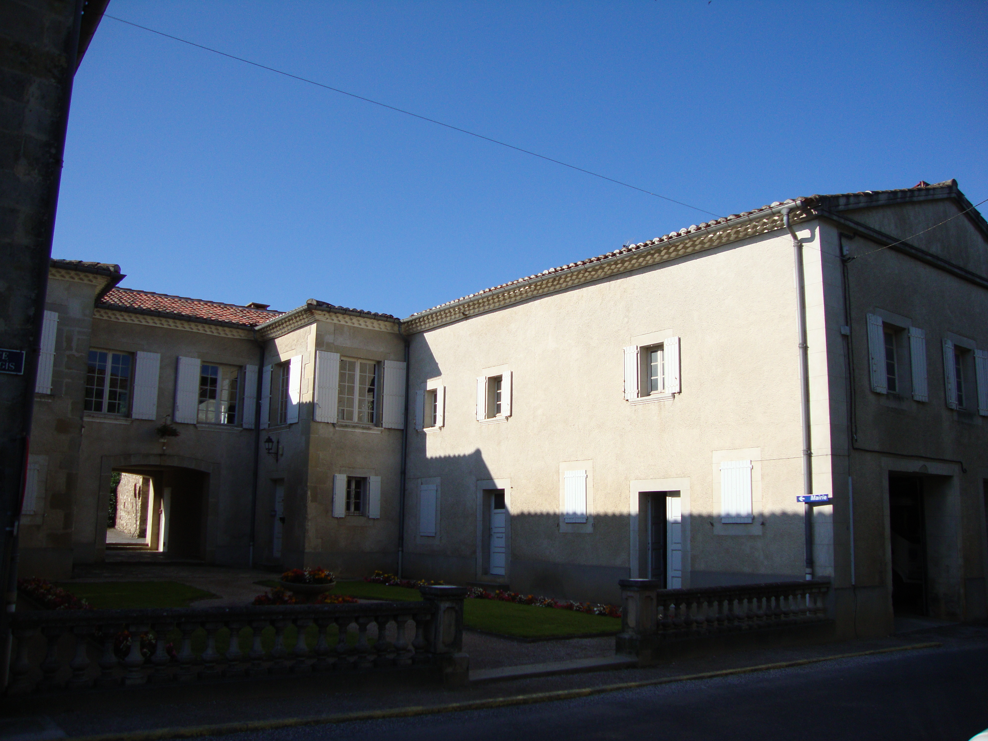 Dourgne (Tarn, Fr) mairie